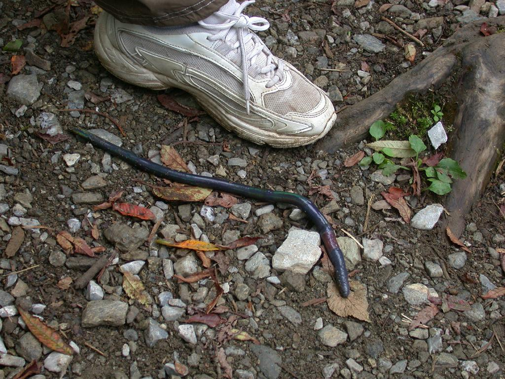 Pheretima sieboldi：シーボルトミミズ 2007.09.27・剣山（徳島県） Mt. Turugi-san, Tokusima pref. Japan